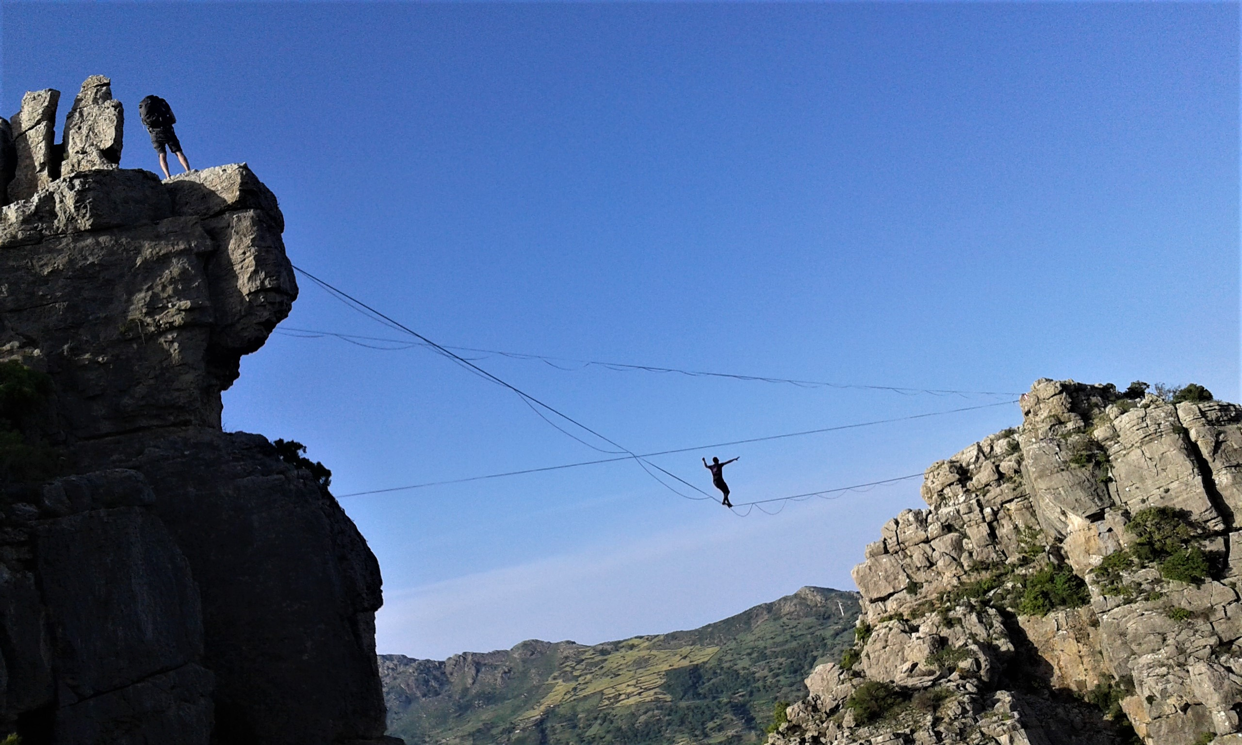 Highline sopra il Canyon di Sa Tappara a Ulassai